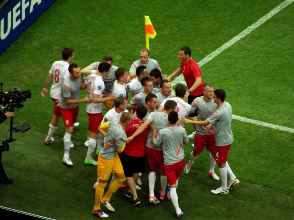 Zdjęcie zrobione w pierwszym dniu UEFA Euro 2012 w Warszawie, dniu otwarcia turnieju i meczu Polska-Grecja.